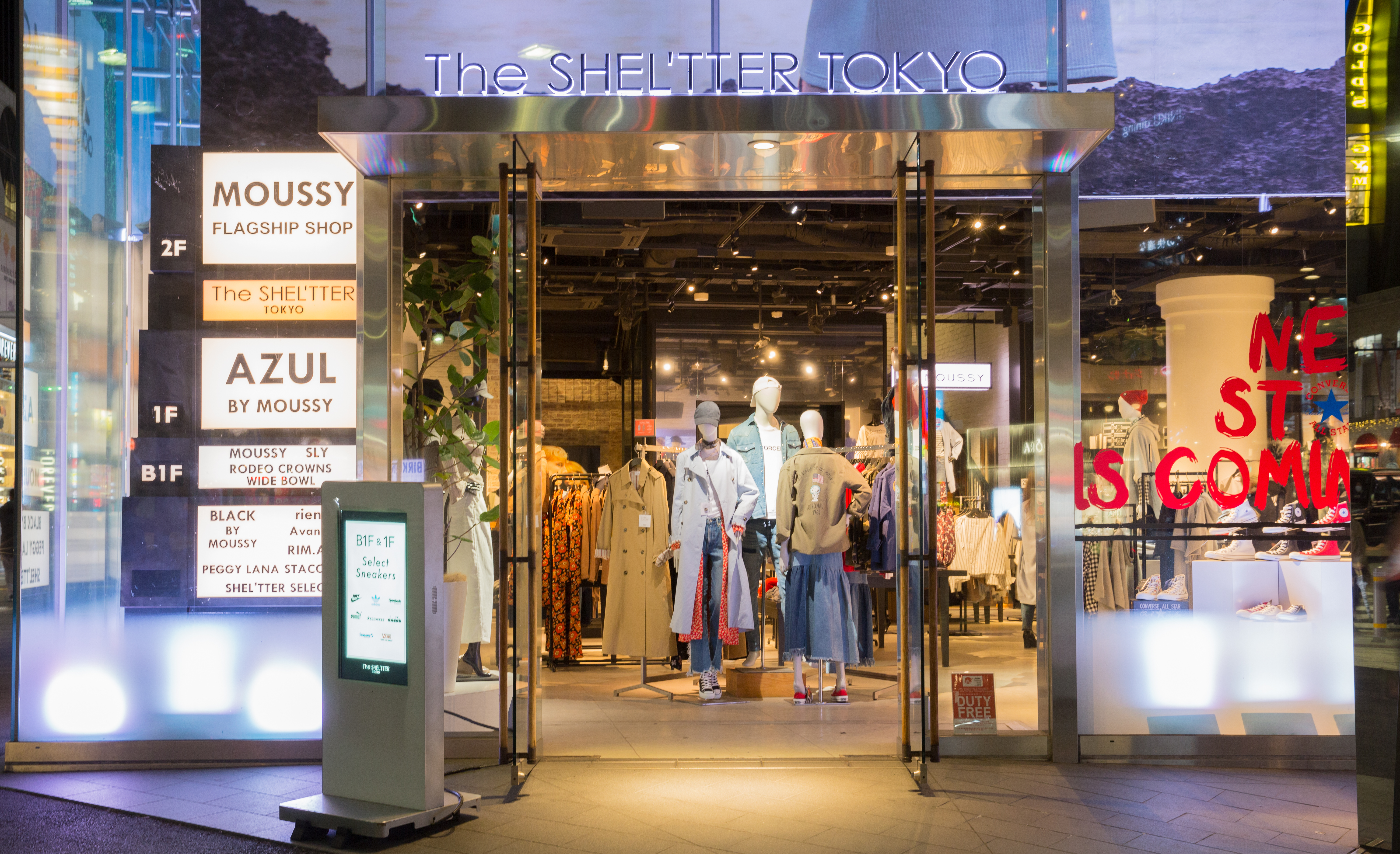 東京都渋谷区神宮前4-30-3 東急プラザ表参道原宿B1F,1F,2F